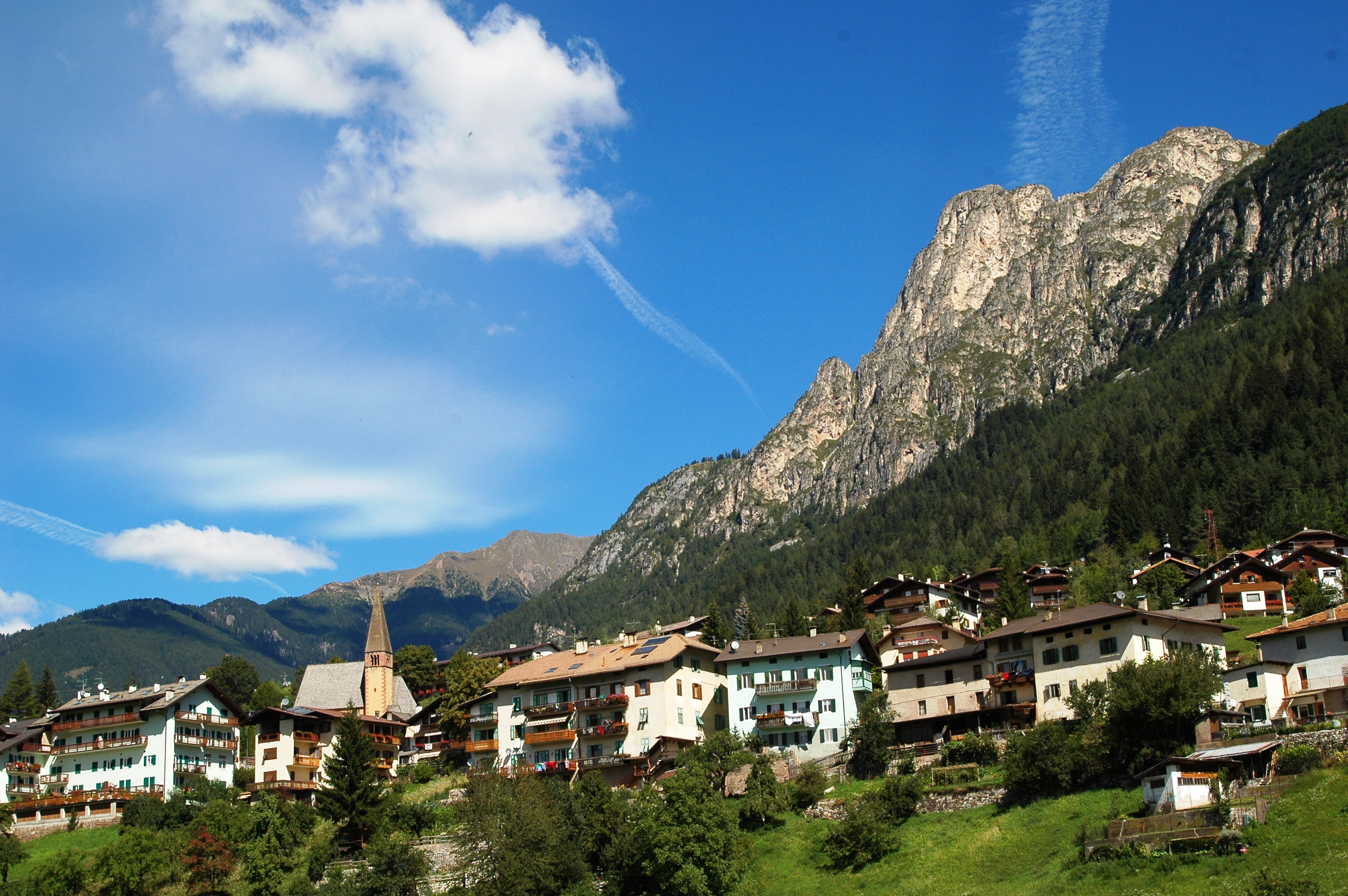 Alpen, Südtirol, Tesero, Blick Richtung Proprian